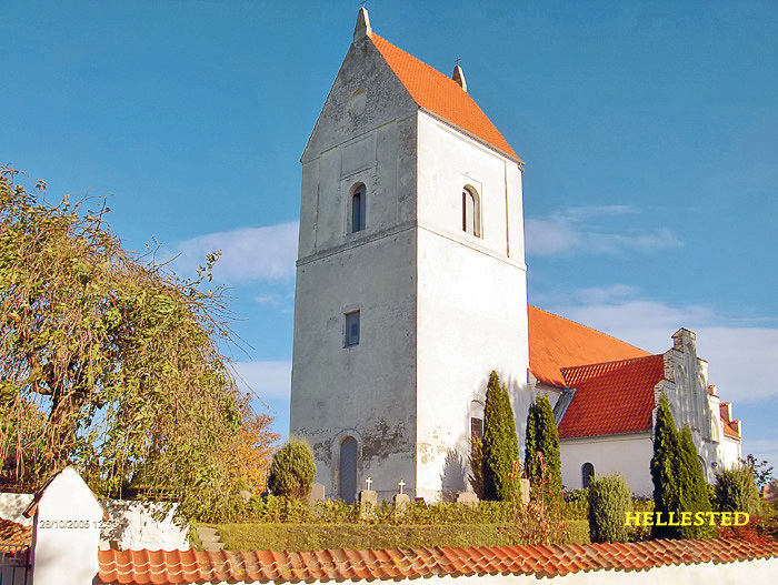 fra sydvest